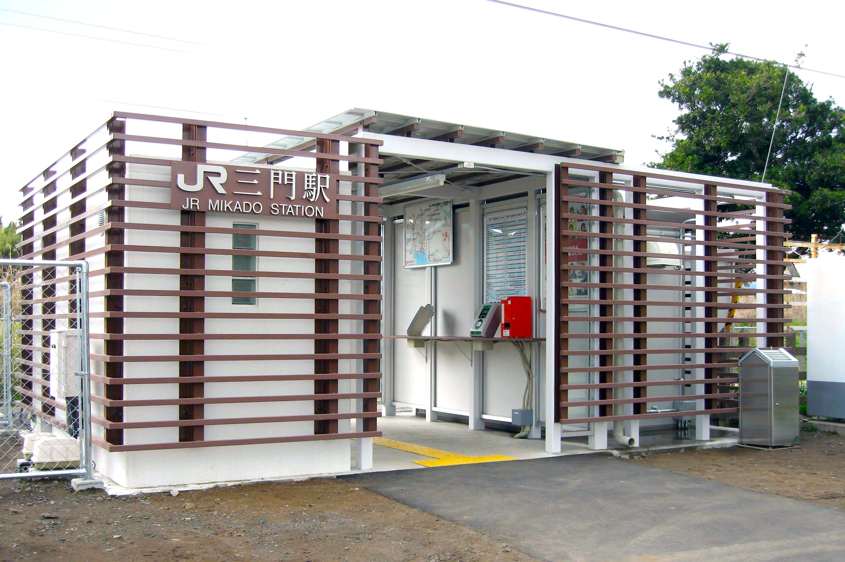 Mikado station, Sotobo Line, Chiba, Japan, 三門駅駅舎（2007年新築）